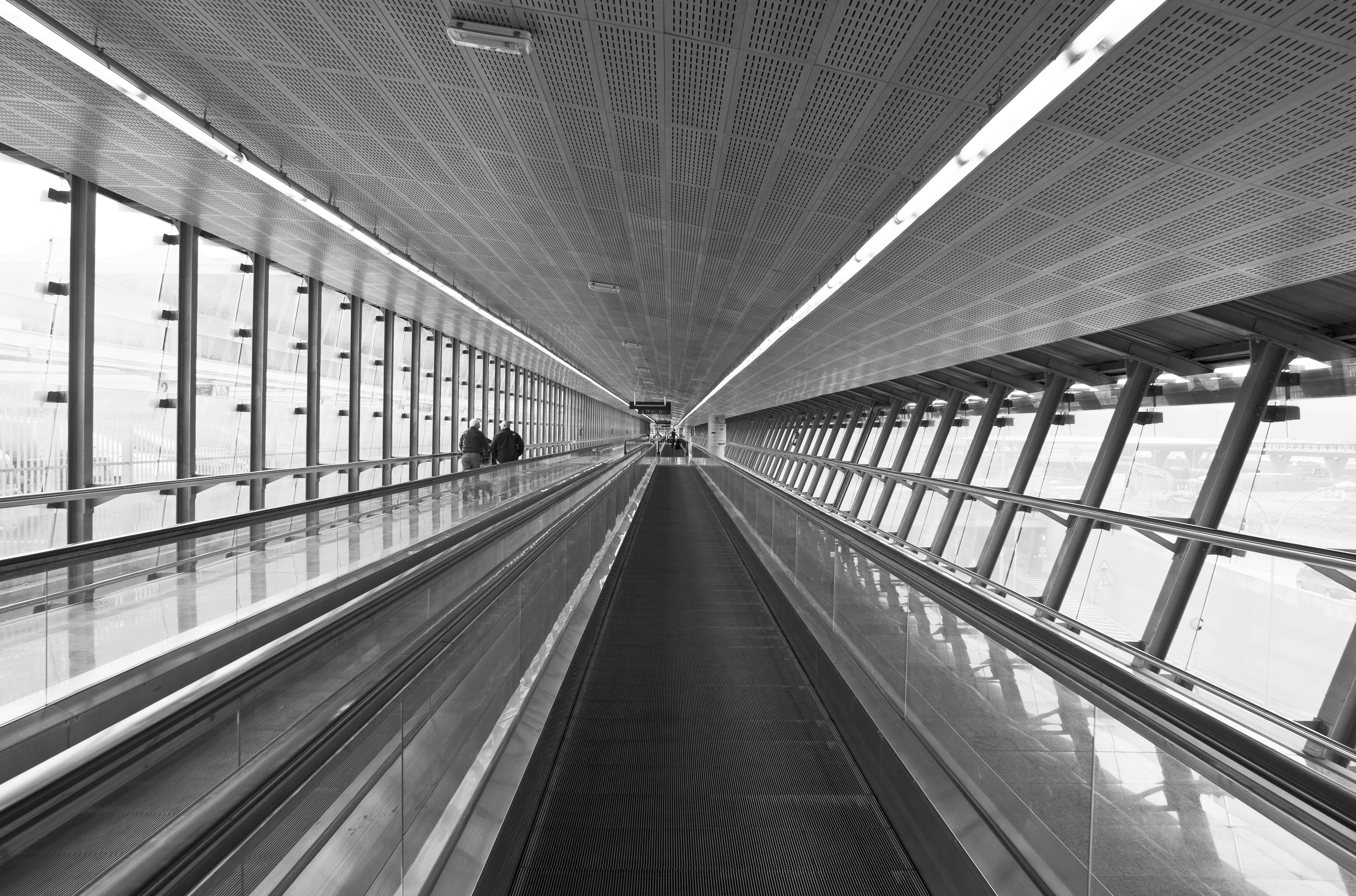 Transfer hall